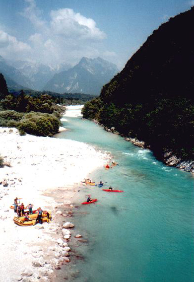 Kajak und Rafting am Oberlauf der Soča bei Bovec